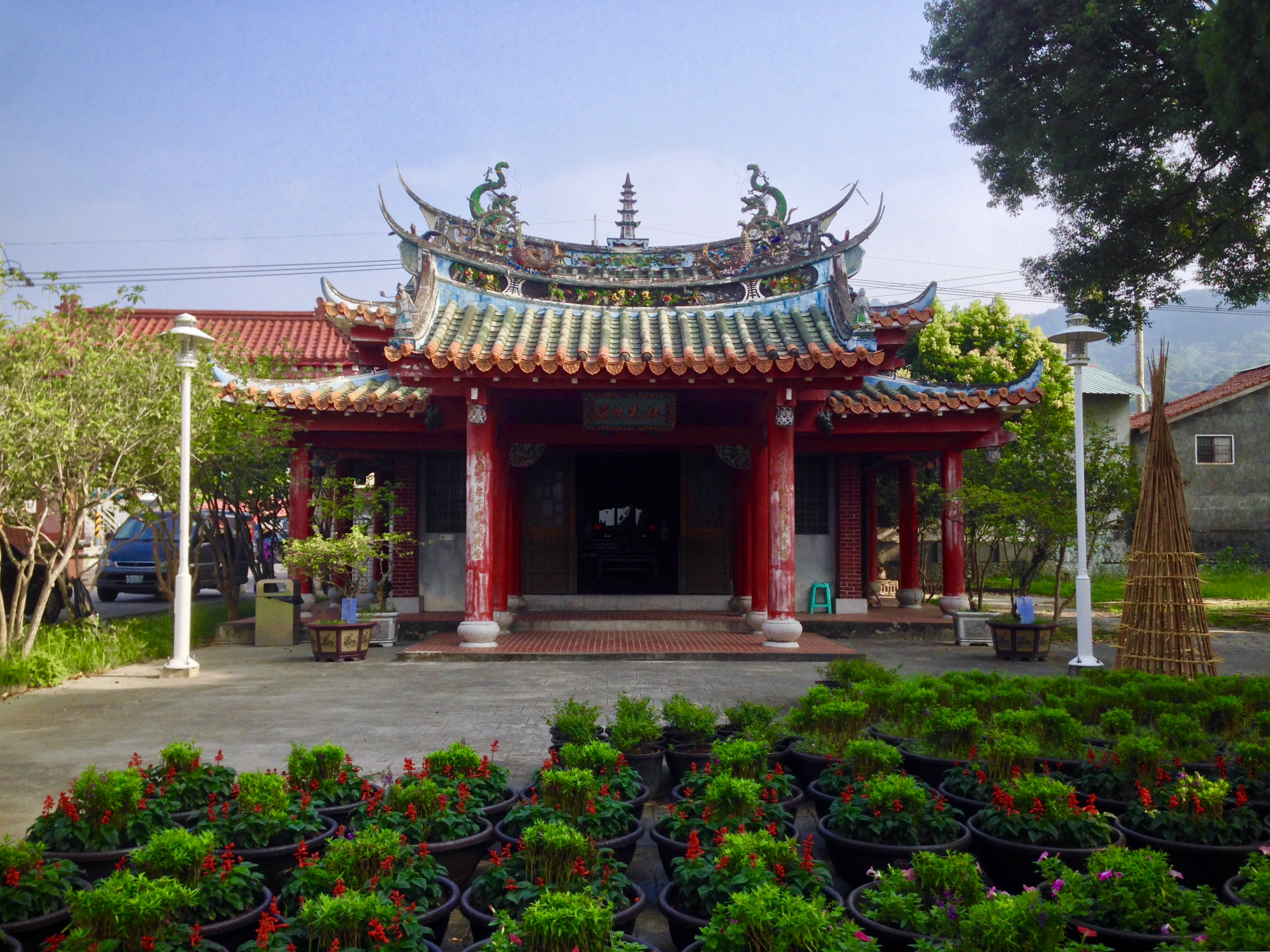 中文（台灣）: 林先生廟正面照